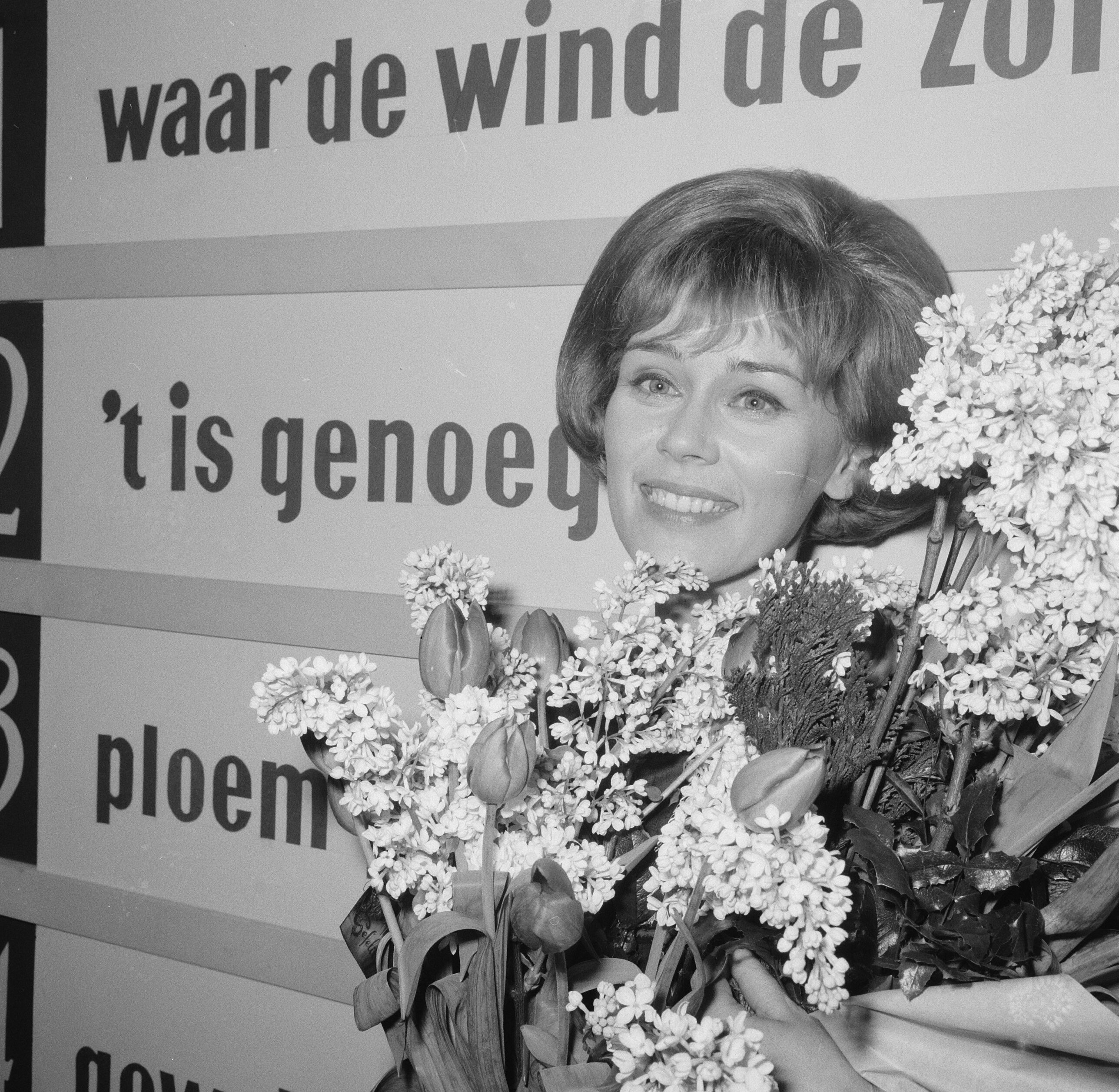 Collectie / Archief : Fotocollectie Anefo Reportage / Serie : [ onbekend ] Beschrijving : Finale Nationaal Songfestival 1965, winnares Connie Vandenbos Datum : 13 februari 1965 Trefwoorden : artiesten, muziek, songfestivals, zangeressen Persoonsnaam : Vandenbos, Conny Instellingsnaam : Nationaal Songfestival Fotograaf : Nijs, Jac. de / Anefo Auteursrechthebbende : Nationaal Archief Materiaalsoort : Negatief (zwart/wit) Nummer archiefinventaris : bekijk toegang 2.24.01.03 Bestanddeelnummer : 917-4307